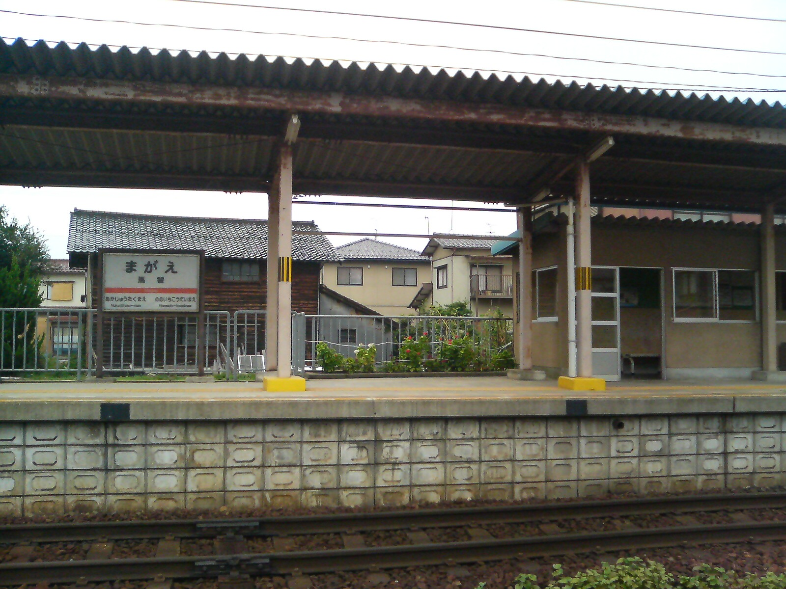 北陸鉄道石川線・馬替駅を2006年9月5日投稿者自身が撮影。